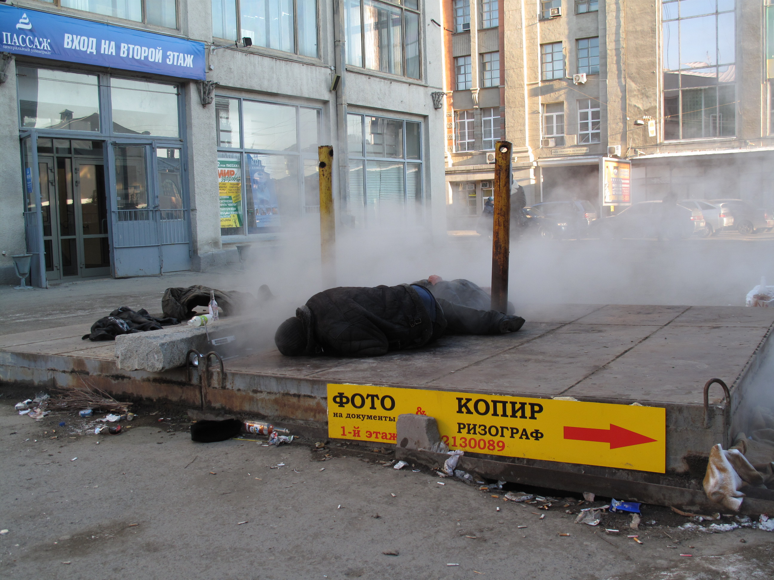 Спящие бездомные в Екатеринбурге